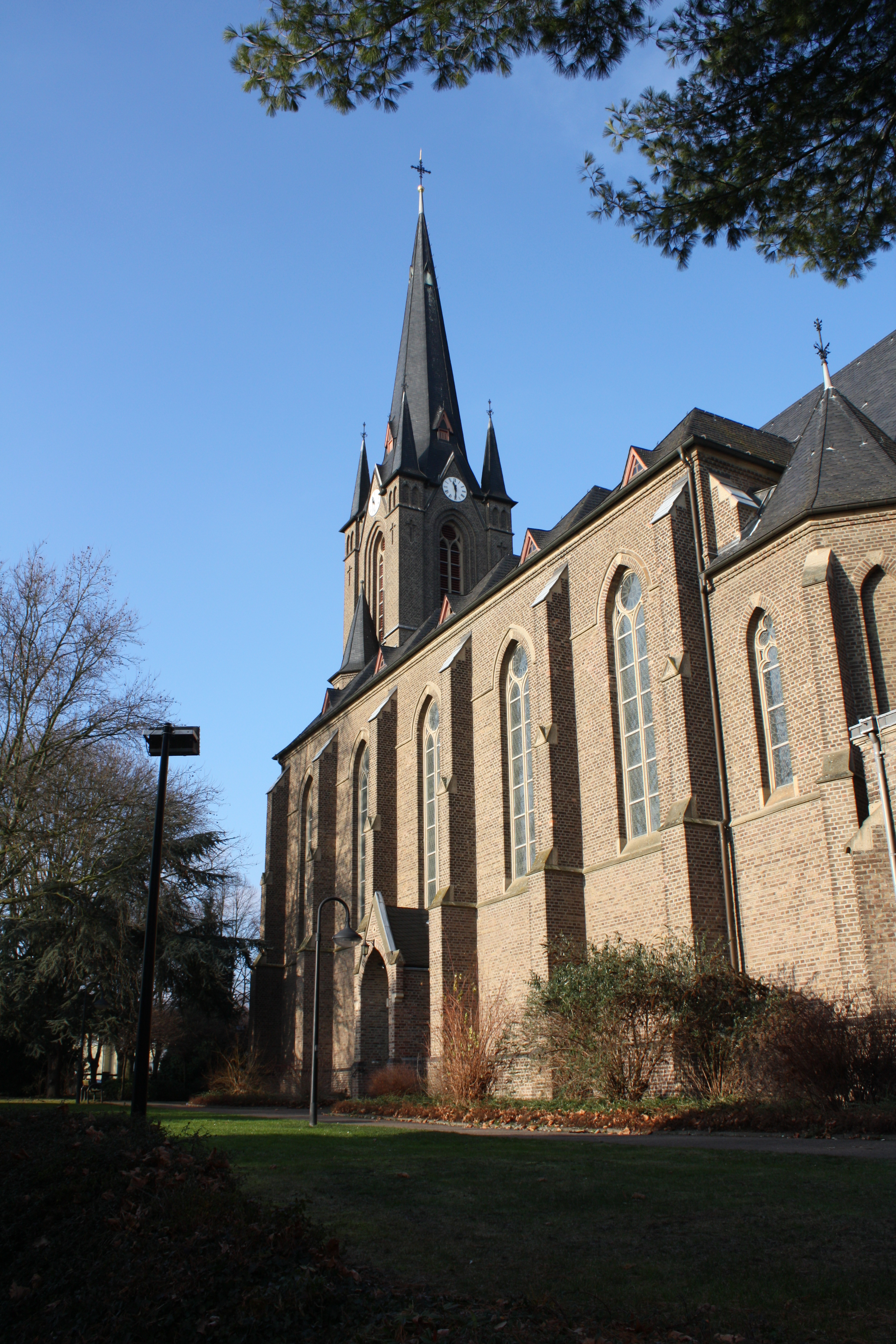 Sankt Dionysius, Gleuel